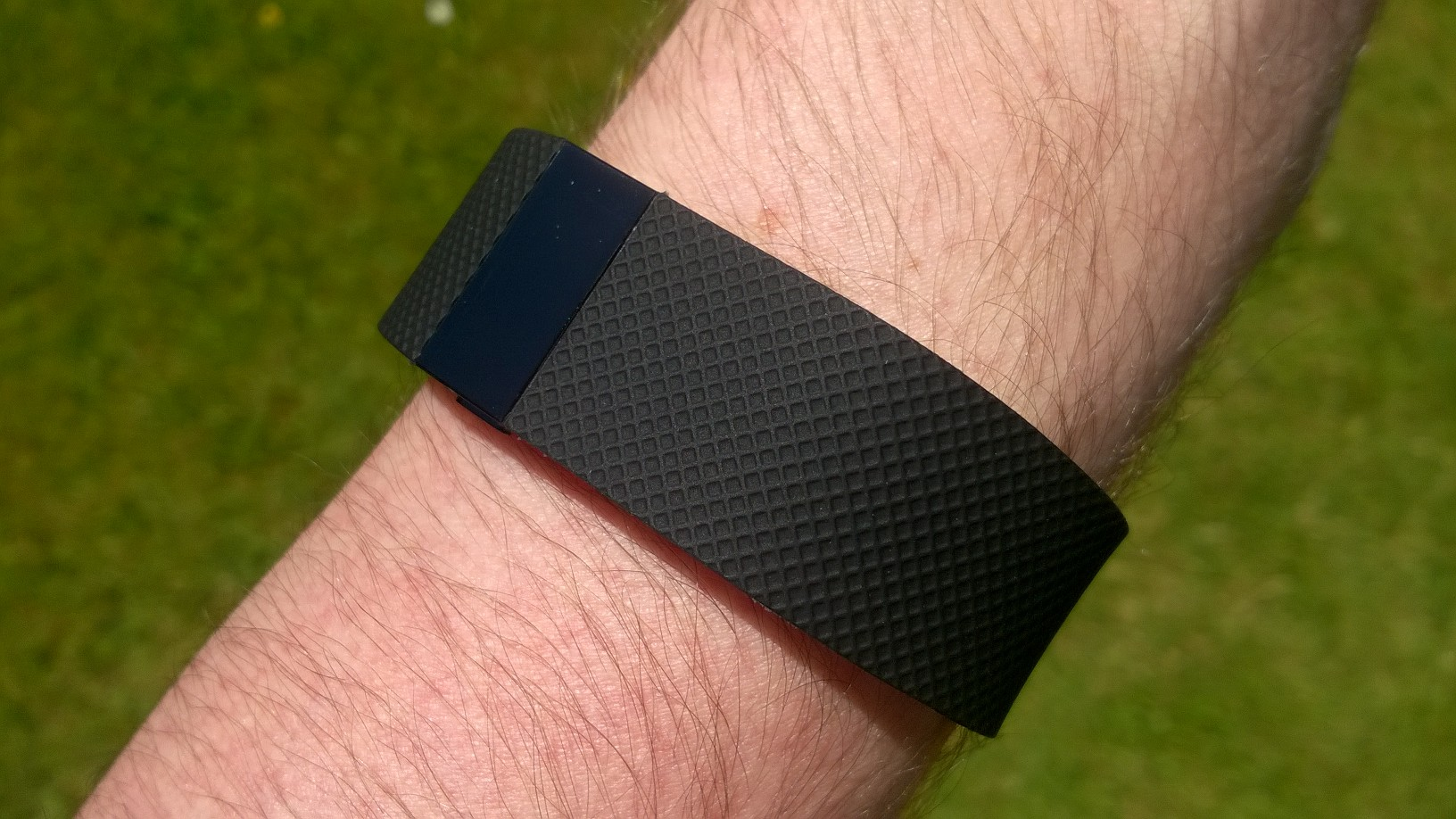 Traqueur d'activité Fitbit Charge HR au poignet